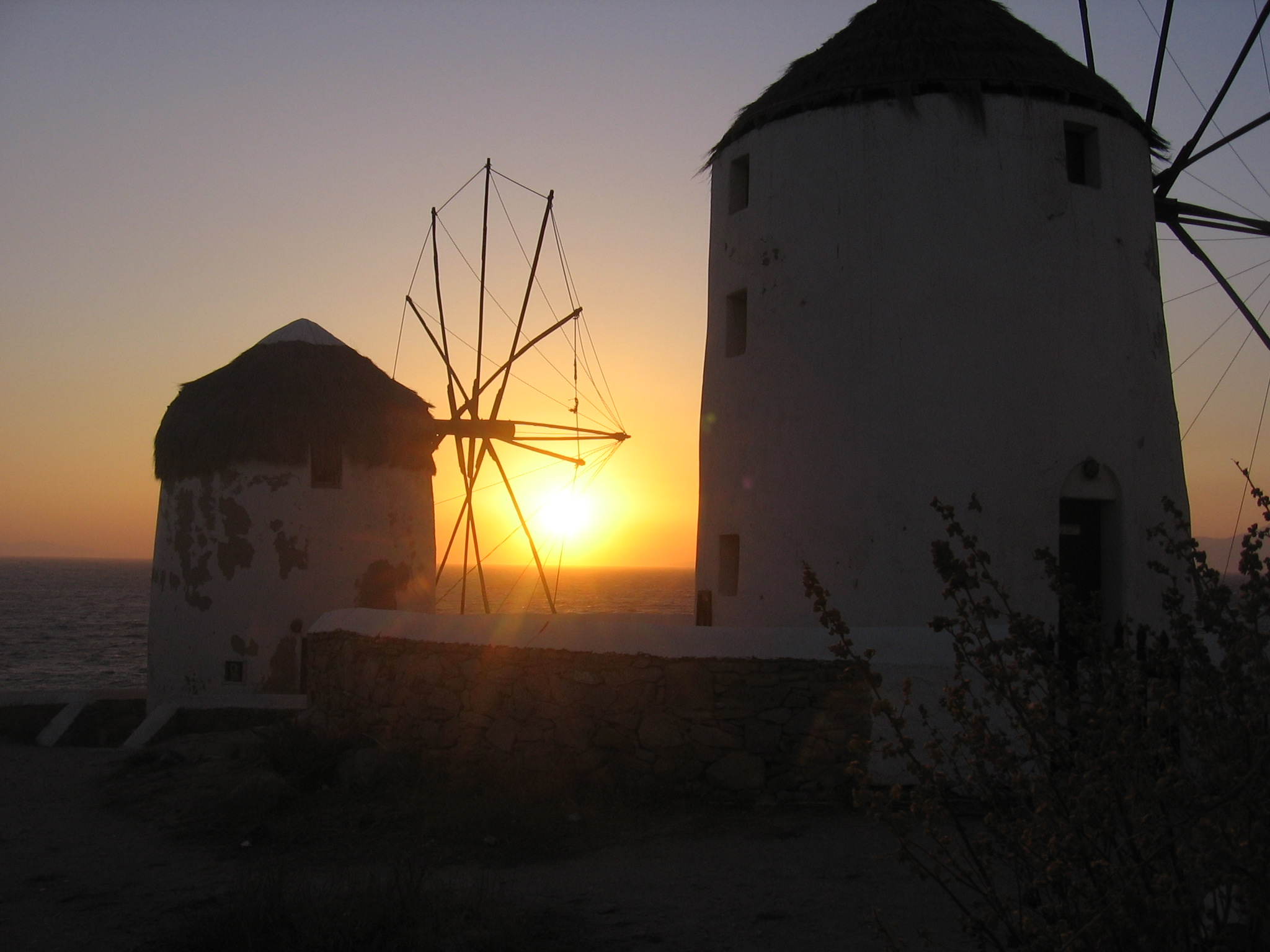 Βρέθηκα στην Μύκονο τον Ιούνιο του 2006... Κάτι απρόσμενο... Πρόταση του ξαδερφού μου από την Αυστραλία που ήθελε να γνωρίσει τις ελληνικές ομορφιές... Ε! Λοιπόν αυτό ειναι το ξακουστό ηλιοβασίλεμα της Μυκόνου...